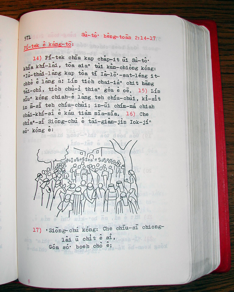 Bân-lâm-gú: zh-min-nan:Âng-phôe Sèng-keng tē 571 bīn. Chok-chía: A-giâu hip--ê (2004). Chit pún chhin-chhiūⁿ sī āu--lâi (thau?) hoan-ìn--ê. Sú-iōng hí-khó-su: chit tiuⁿ siòng sī zh-min-nan:GFDL. zh-min-nan:Âng-phôe Sèng-keng pún-sin ê pán-koân bô khak-tēng.